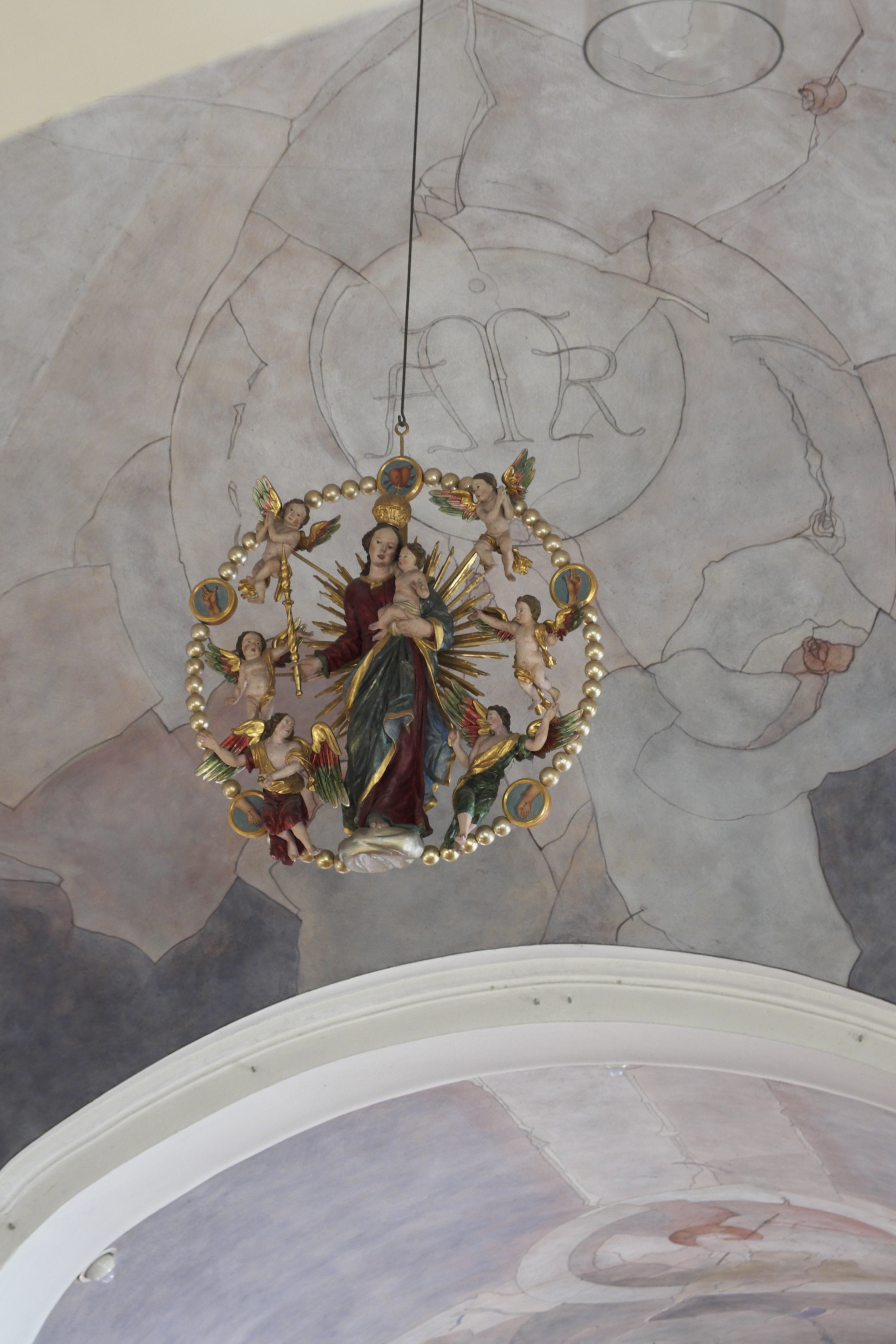 St. Pankratius in Mitterfischen (Pähl) im Landkreis Weilheim-Schongau (Bayern/Deutschland), Rosenkranzmadonna aus dem 18. Jahrhundert